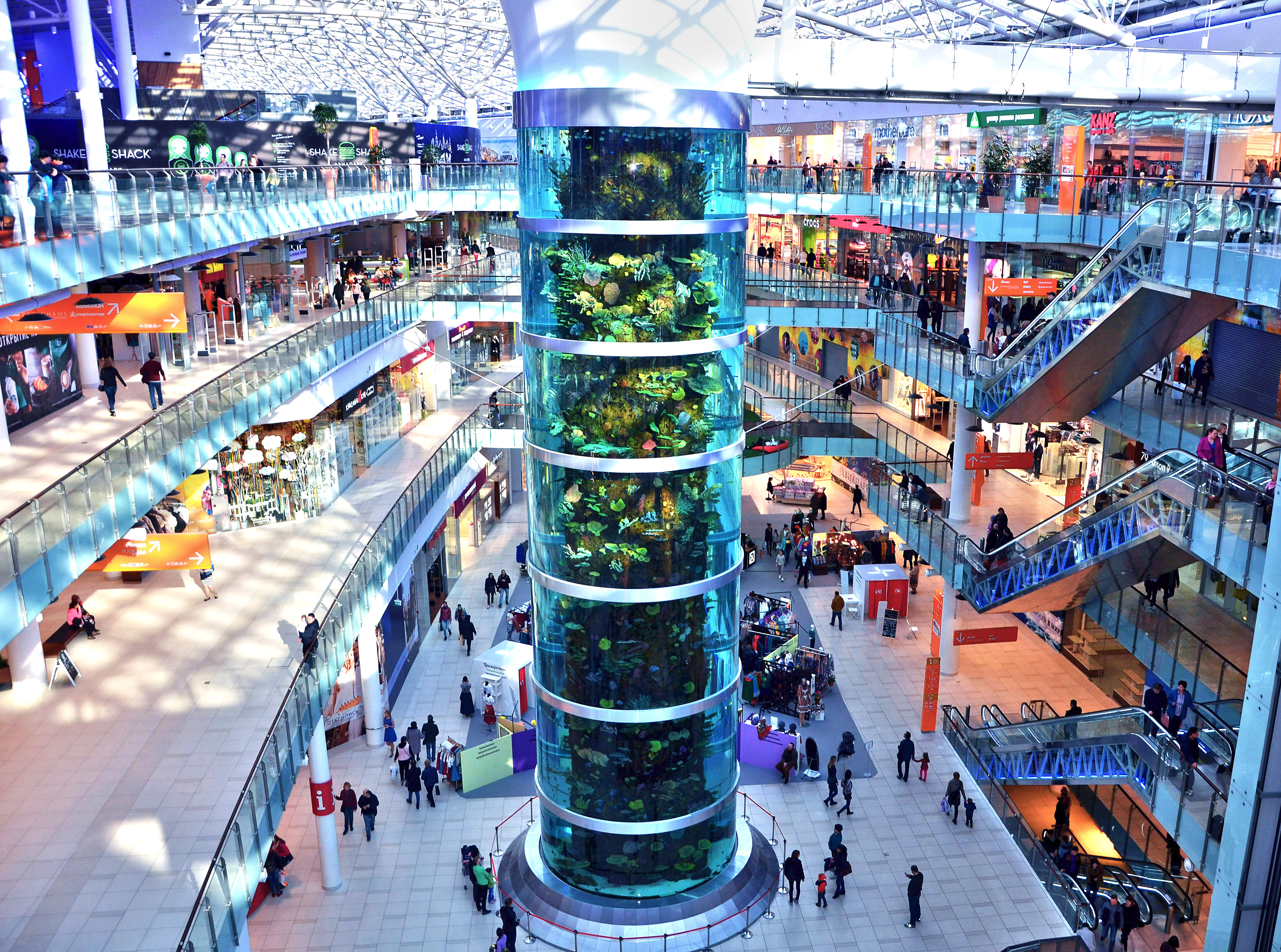 Aviapark. Giant aquarium